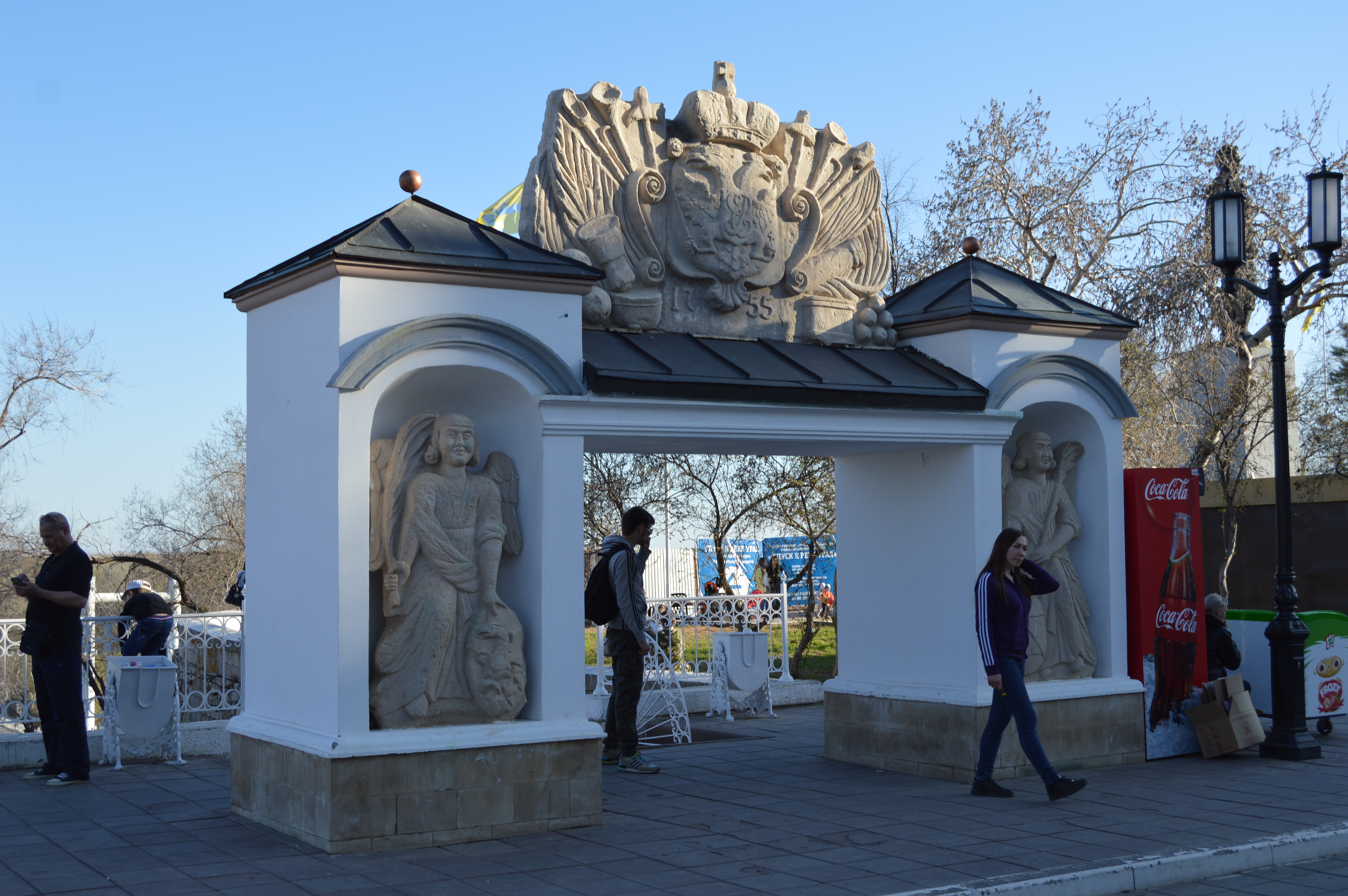 Елизаветинские ворота в городе Оренбург.